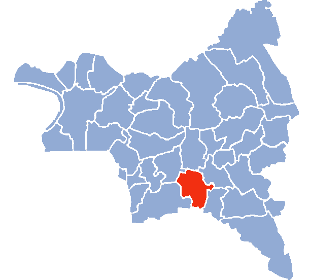 Auteur Hervé SUAUDEAU Licensing Catégorie:Cartes de Seine-saint-Denis Catégorie:Rosny-sous-Bois